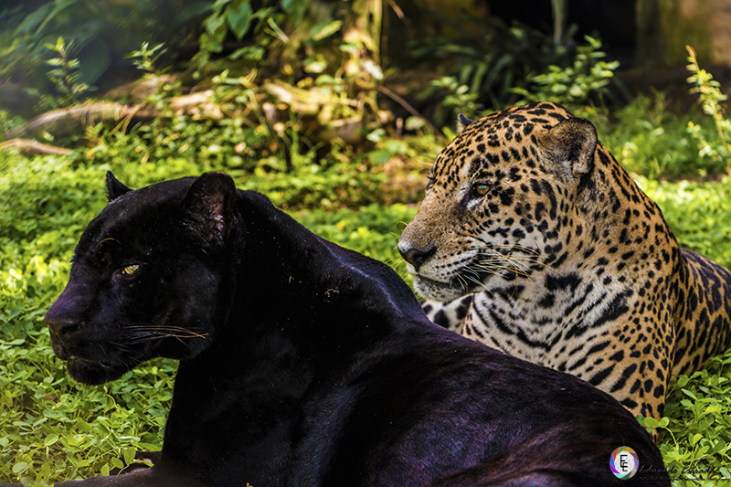 Se puede observar una pareja de jaguares siendo en este caso la hembra un jaguar melanico